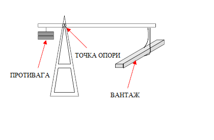 Схема роботи противаги. Файл створений на основі File:Simple Crane diagram..png